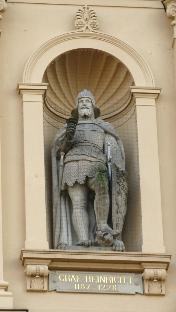 Statue des Grafen Heinrich von Schwerin in der Fassade des Schweriner Schlosses von Gustav Willgohs, um 1855